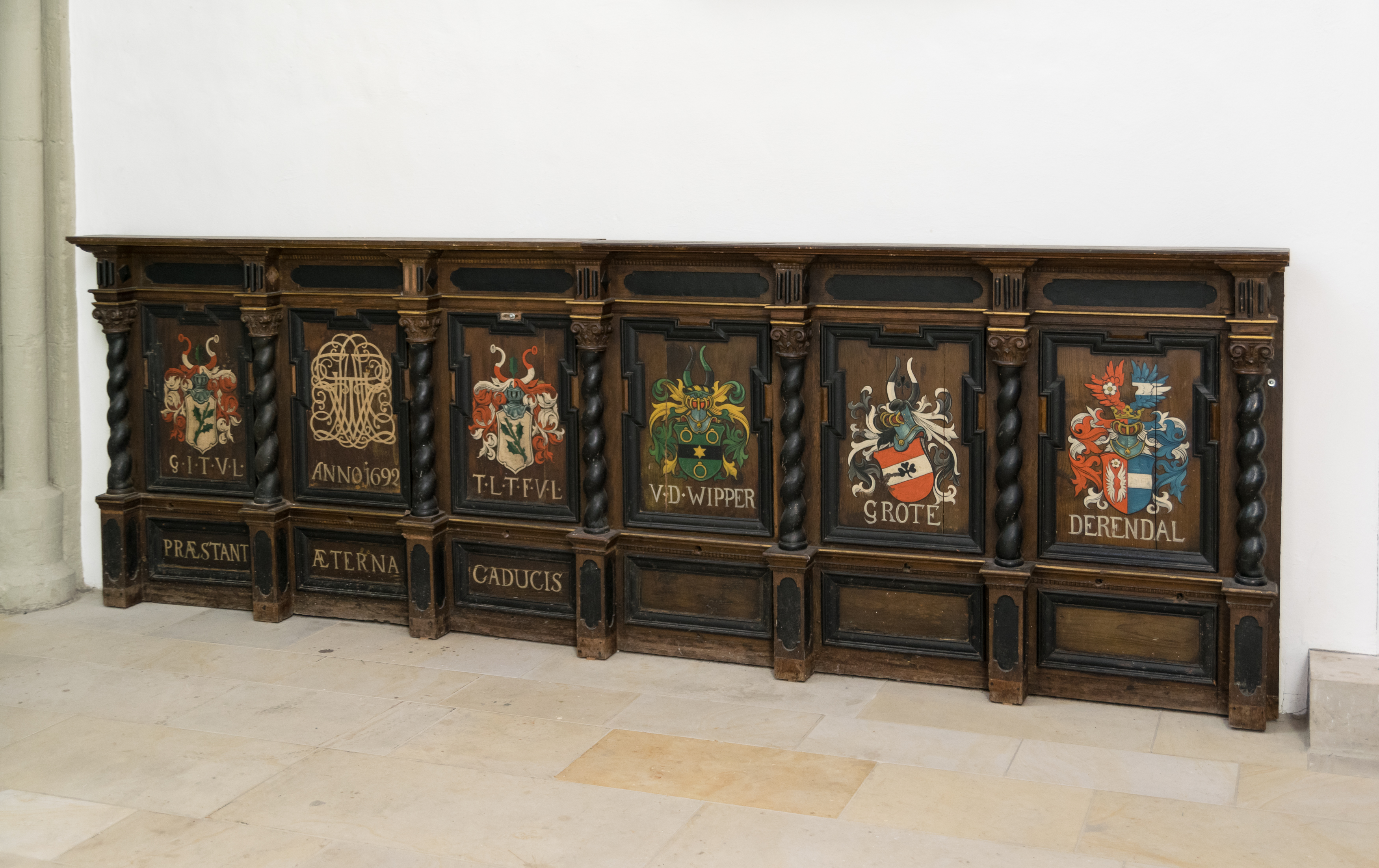 Evangelisch-lutherische Kirche St. Marien, Lemgo; Brüstung des ehemaligen Bürgermeisterstuhls (1692)